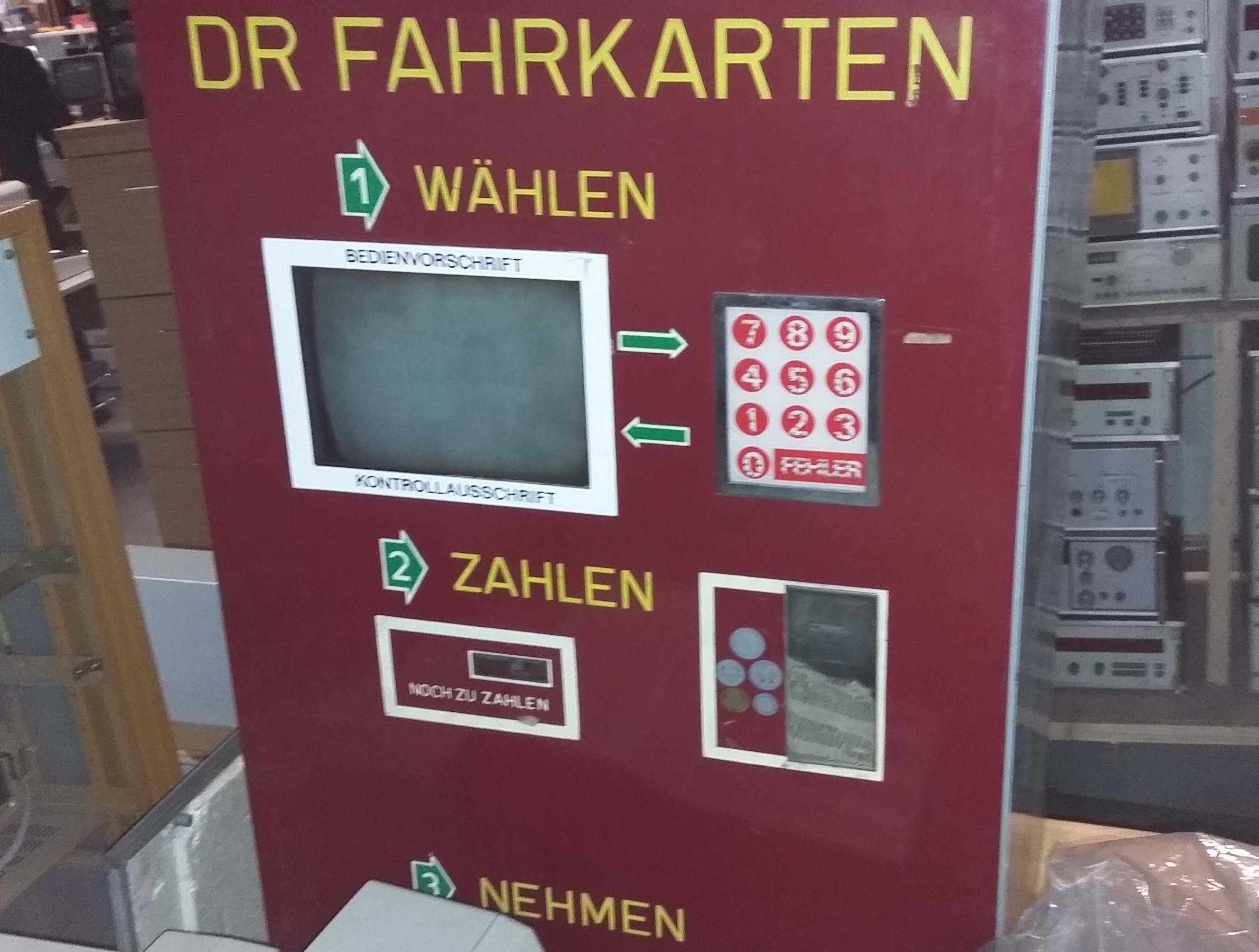 Fahrausweis-Automat MDA im Rechenwerk-Museum Halle (Saale), 2016